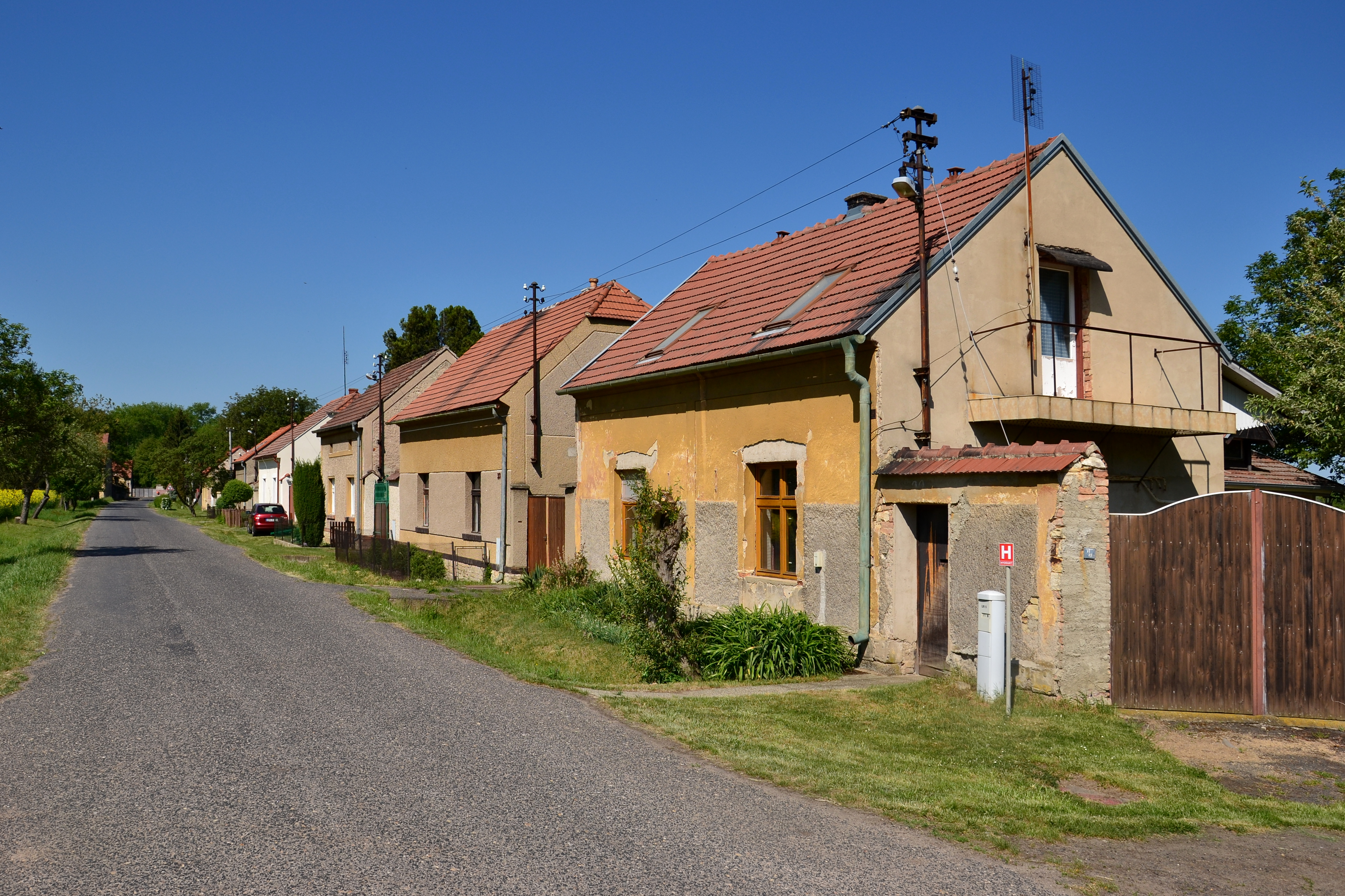 Kystra – ulice na severním okraji vesnice